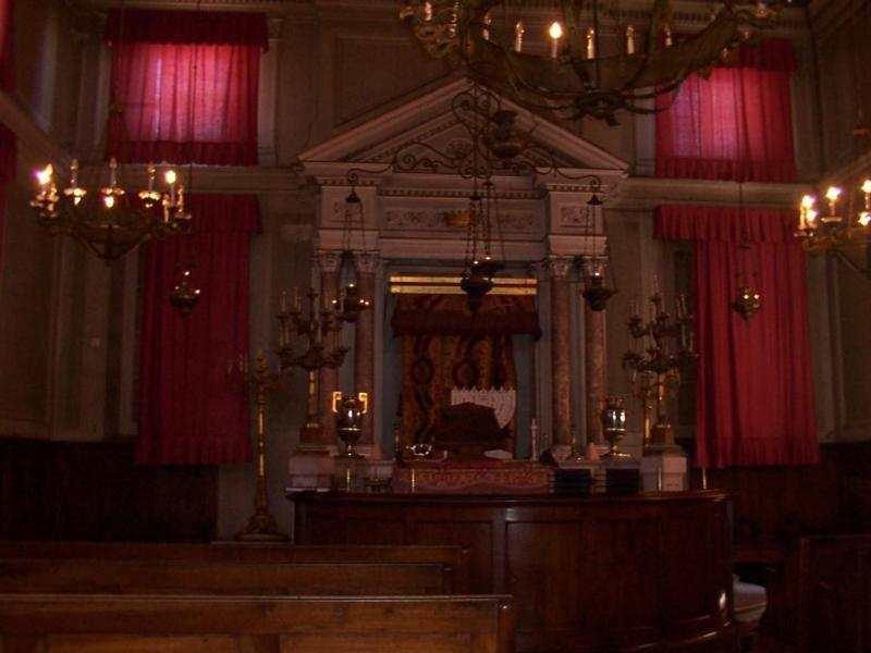 ארון הקודש